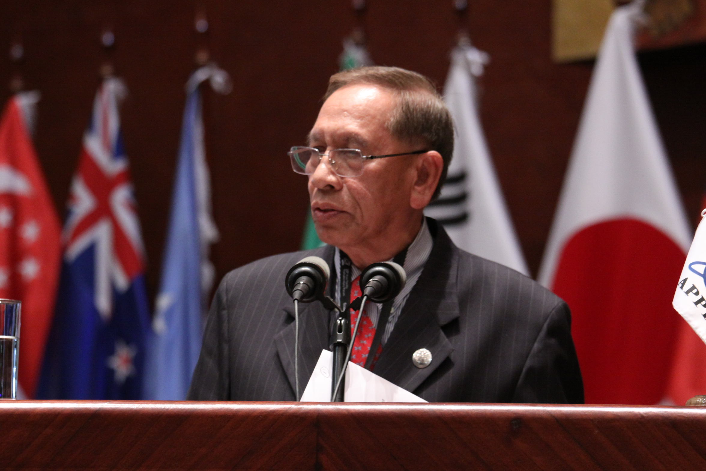 Quito, 12 enero de 2015.- Abu Zahar Ujang de la Delegación de Malasia interviene en la Primera sesión plenaria y situación internacional: Política y Seguridad Fotografía: Hugo Ortiz / Asamblea Nacional